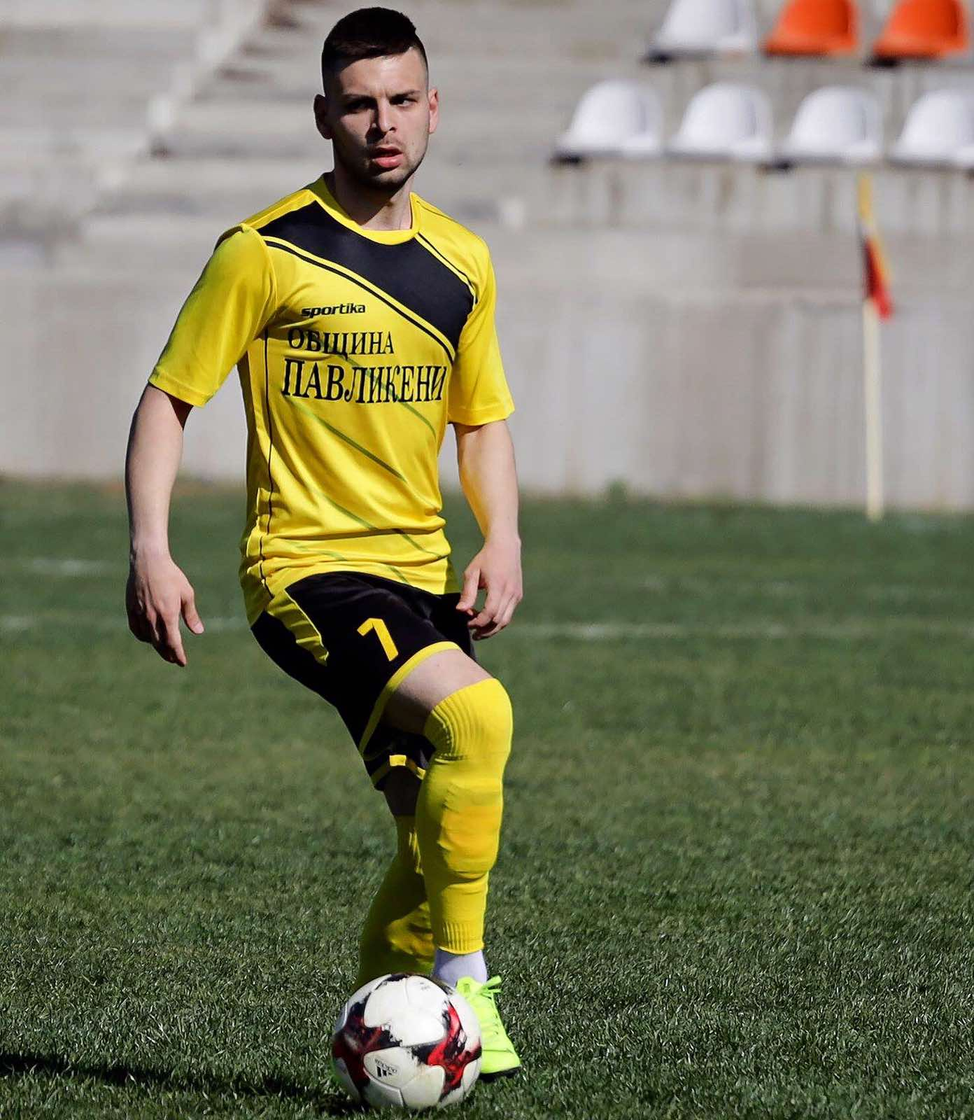 Гинчев с екипа на ОФК Павликени